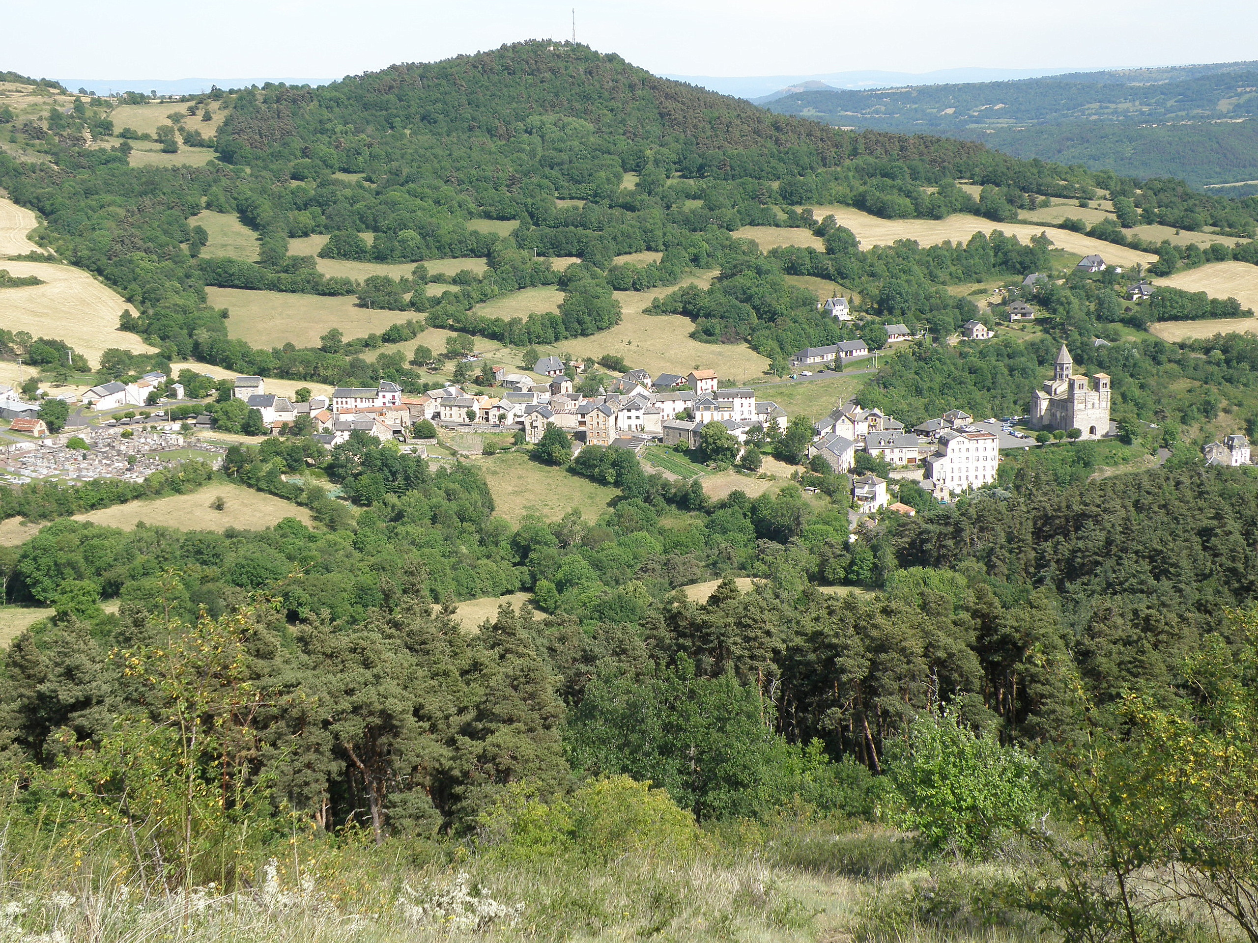 Saint-Nectaire, comm. du Puy-de-Dôme (France, région Auvergne). Vue générale de Saint-Nectaire-le-Haut depuis le flanc oriental du puy de Châteauneuf. À l'arrière-plan, puy de Mazeyres (antenne de télécommunications). Coup d'œil vers le sud-est.